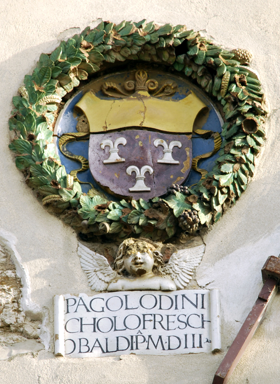 Palazzo Pretorio or Palazzo del Podestà, Galluzzo, Florence, Italy. Escutcheon - Podestà: Frescobaldi. Year: 1503